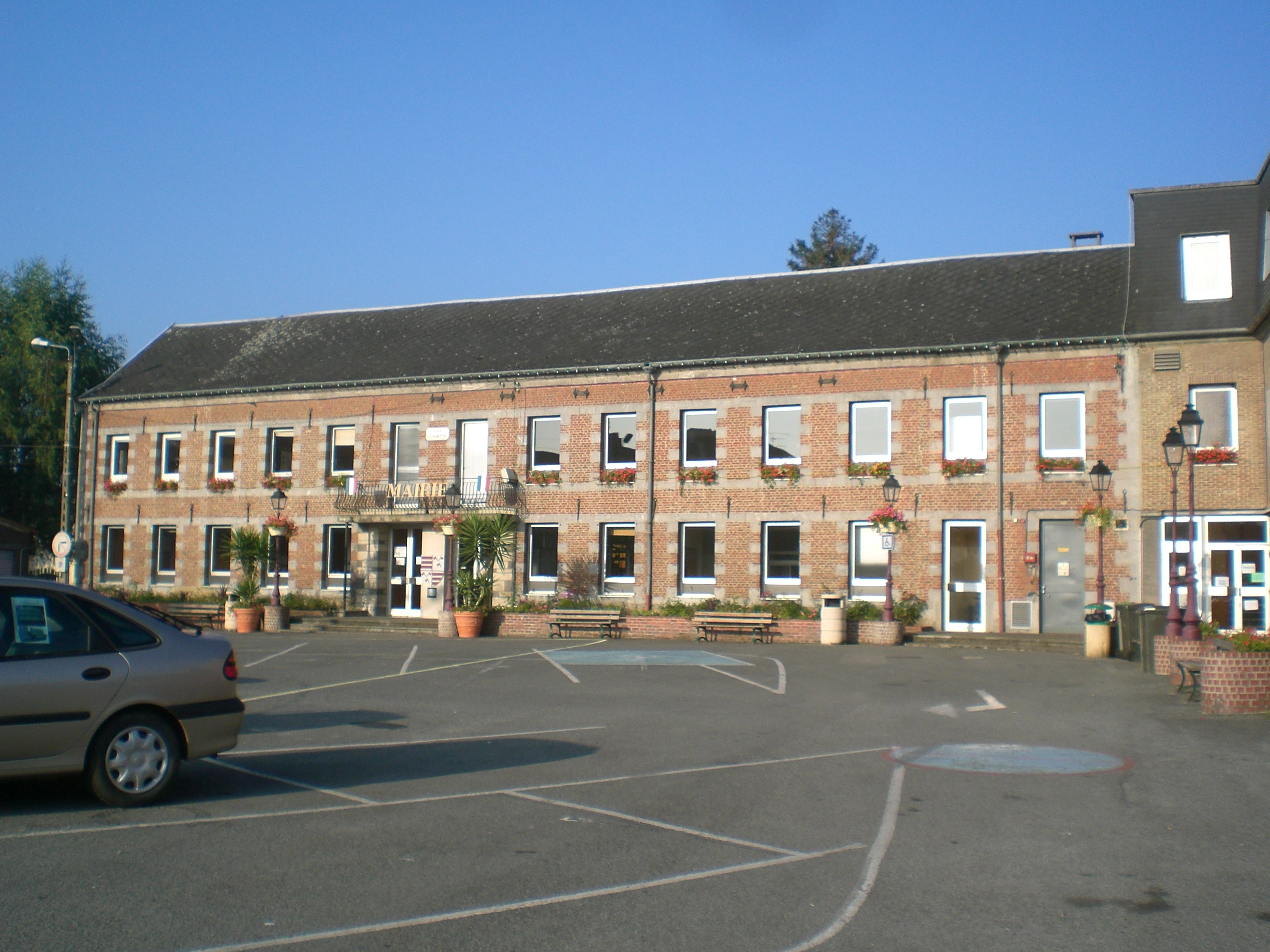 mairie de Ferrière-la-Grande nord france